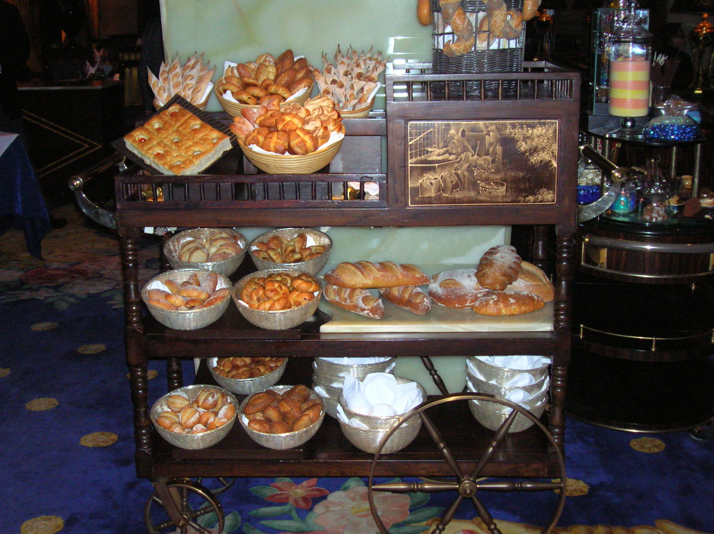 Robuchon a Galera Macau